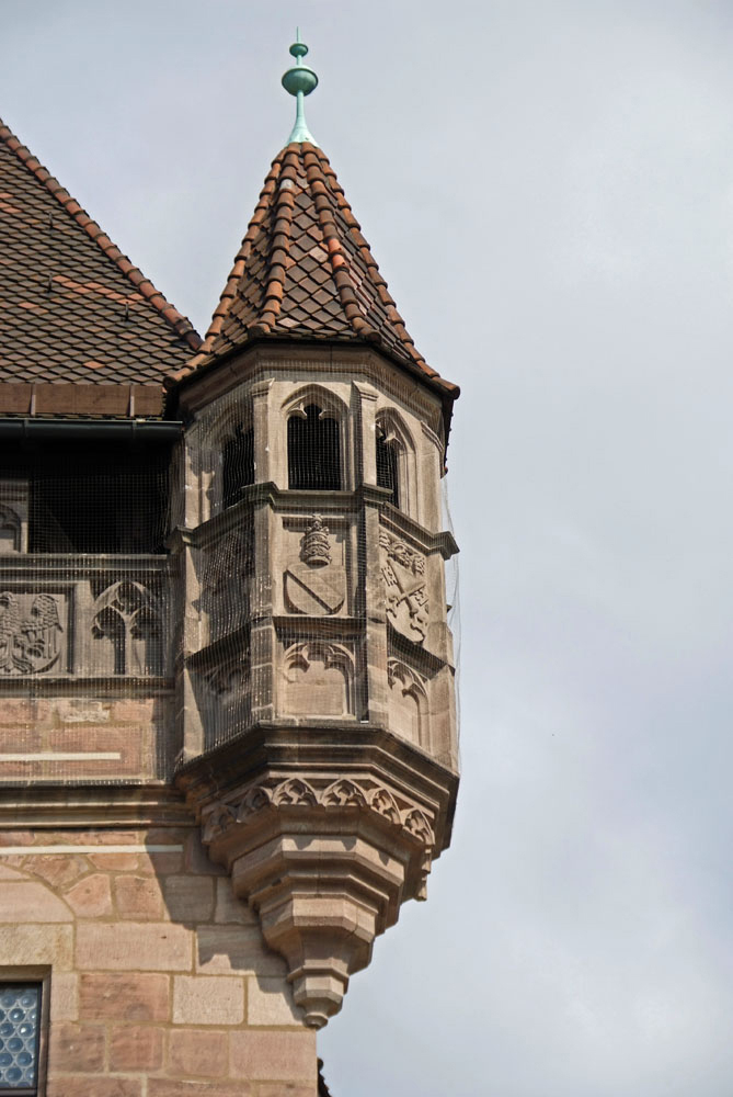 Detail am Nassauer Haus Nürnberg